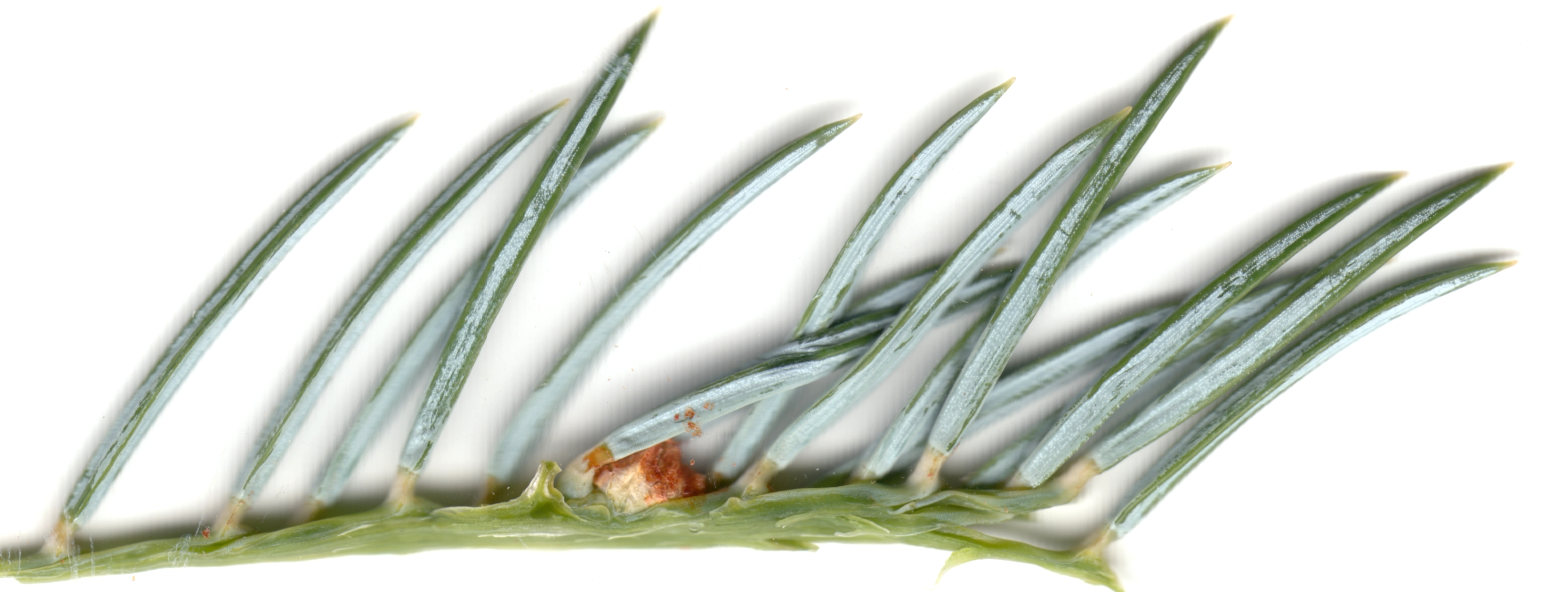 Хвоя ели голубой